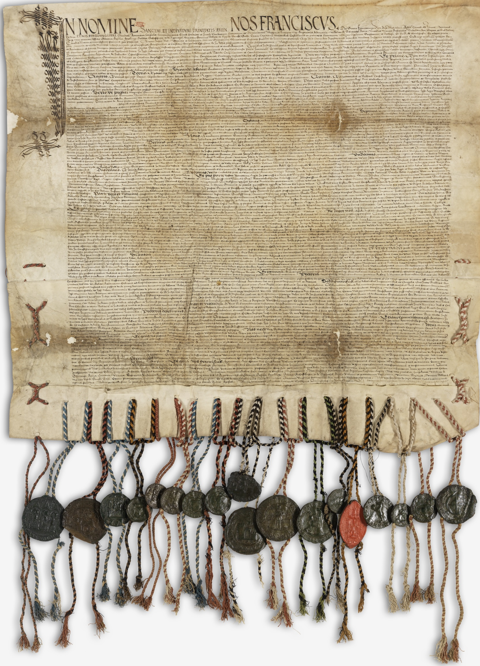 Exemplaire en latin du traité conclu à Fribourg entre François Ier et les cantons suisses (1516) portant les sceaux des cantons et de leurs alliés.